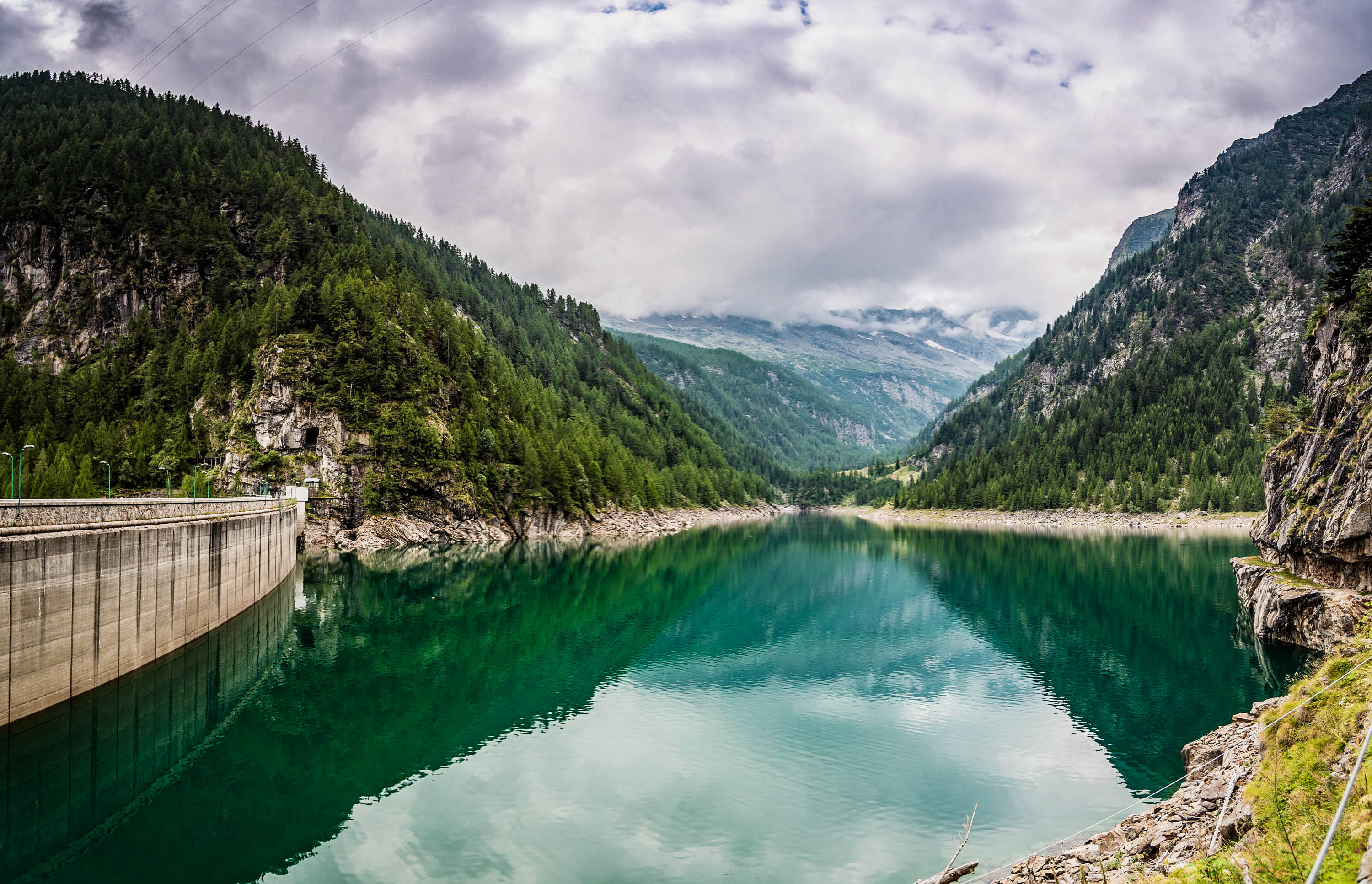 Lago di Campliccioli - Escursione di Istanti in Viaggio